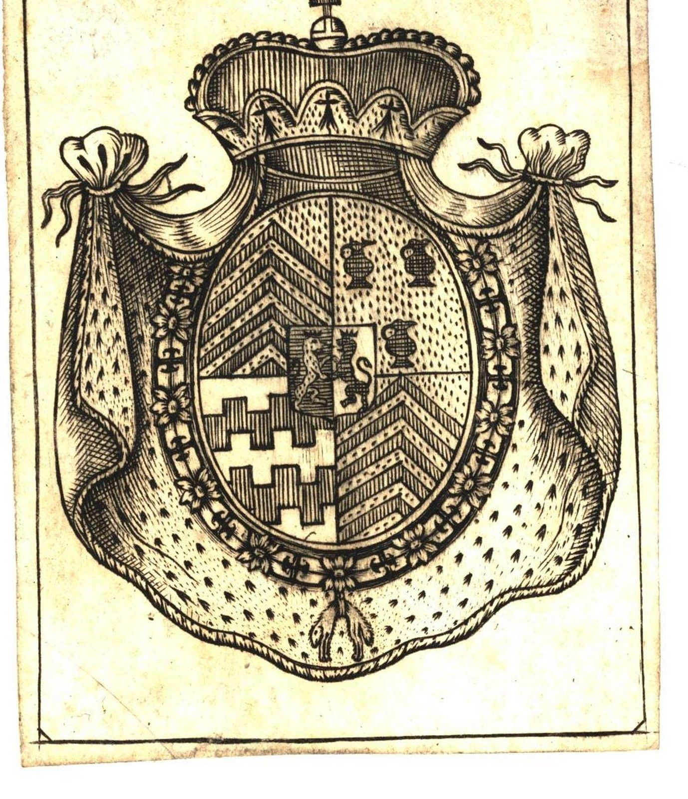 Blason de Casimir Pignatelli (1727-1801), comte d'Egmont.